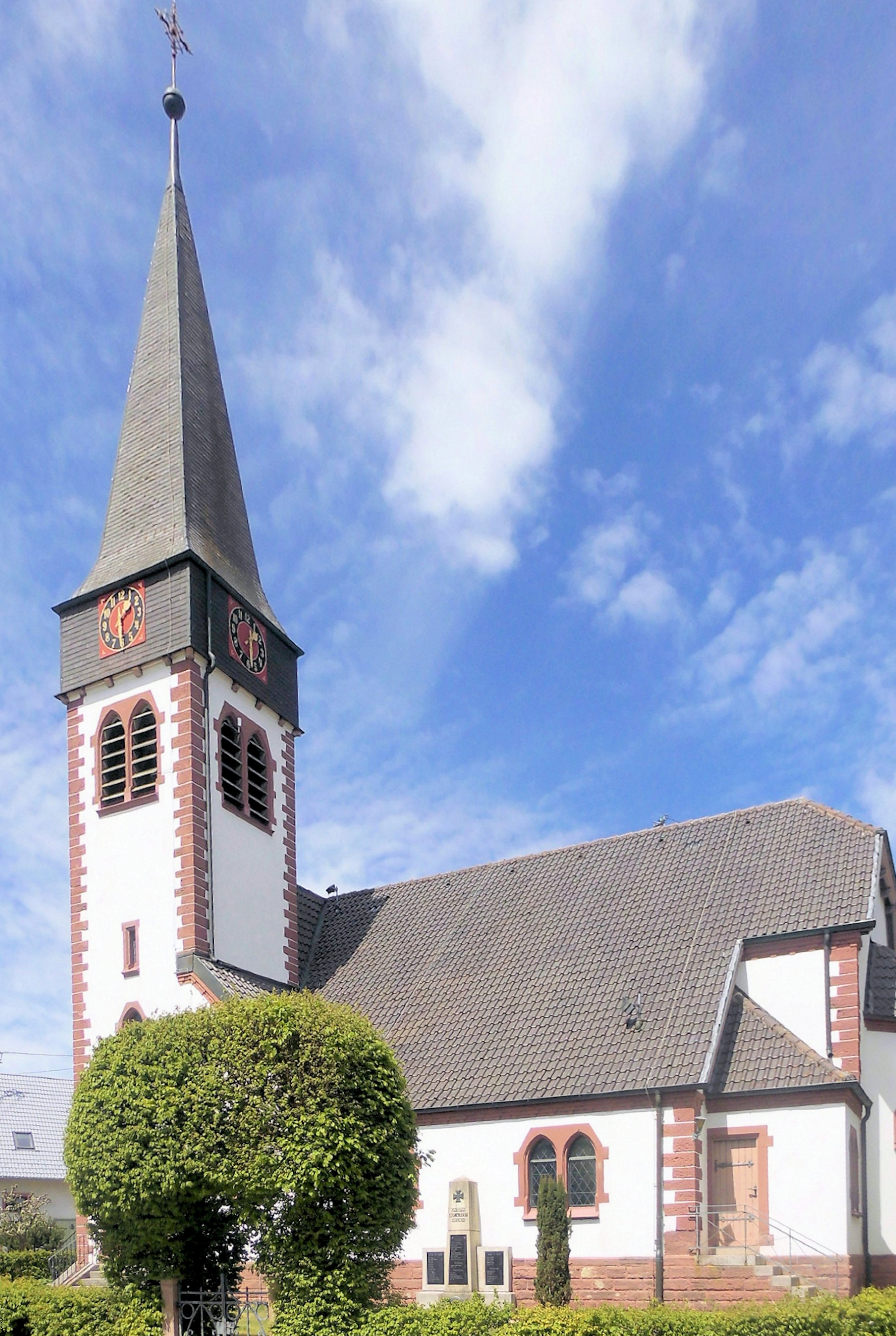 evangelische Kirche in Biesingen, Stadt Bad Dürrheim, Deutschland